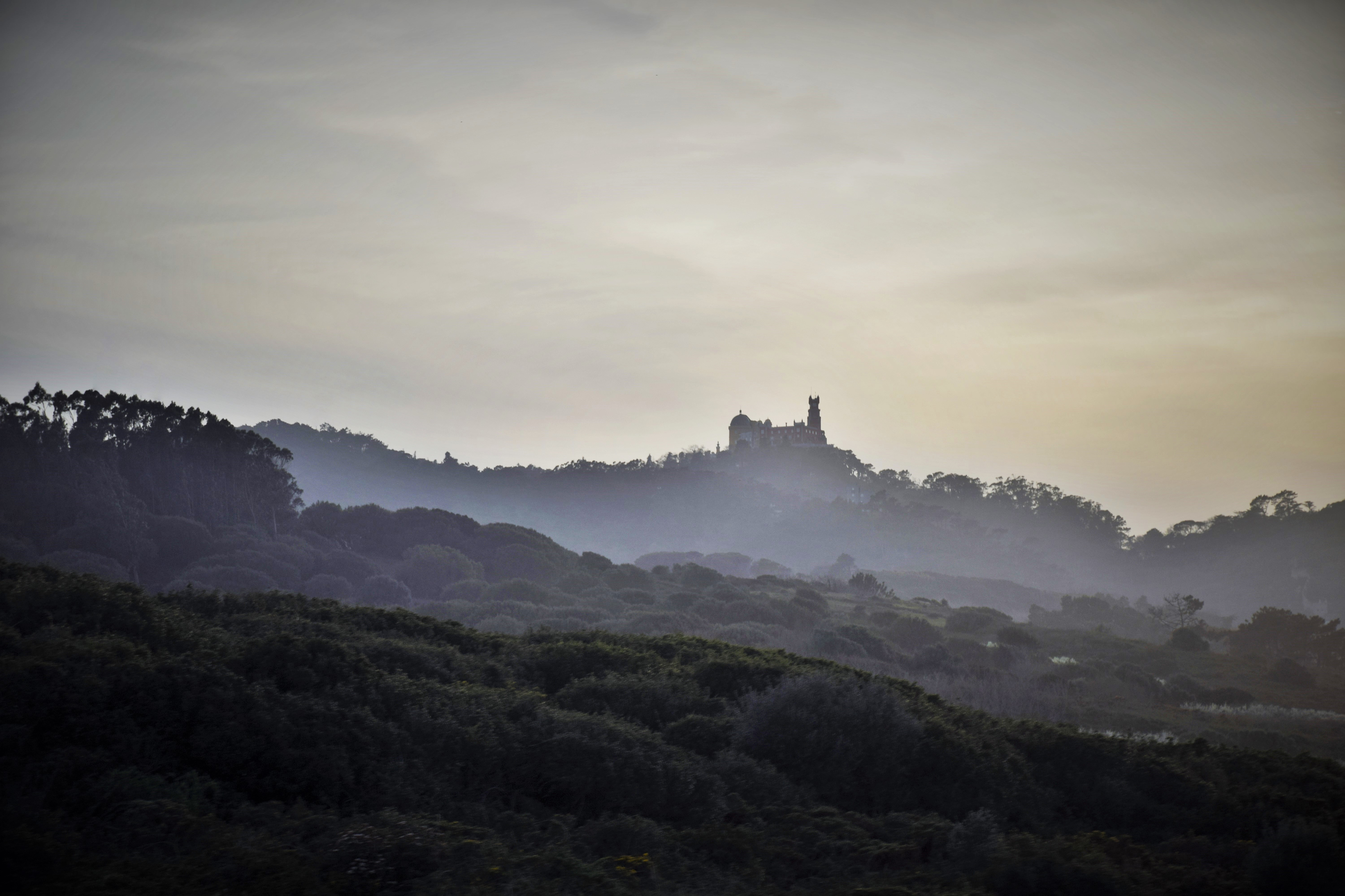 Serra de Sintra com vista para o palácio da Pena This is a photography of a Site of Community Importance in Portugal with the ID: PTCON0008. Natura2000 entry, EEA entry